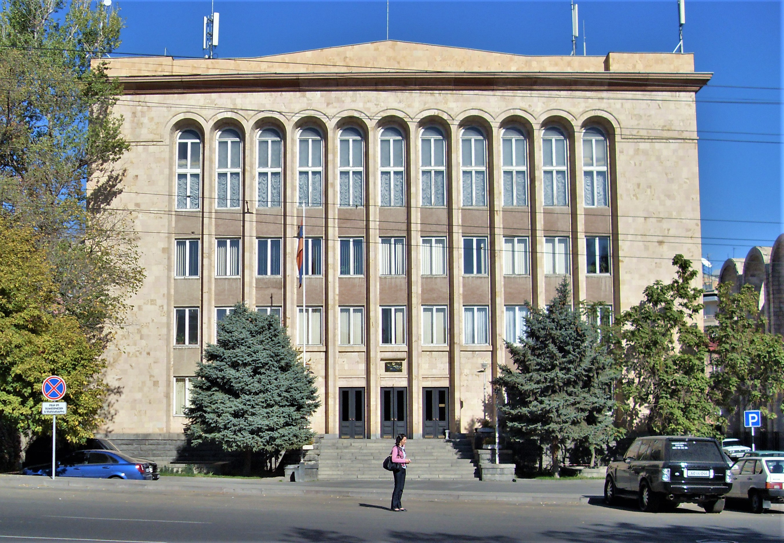 Սահմանադրական դատարանի շենքը Երևանում